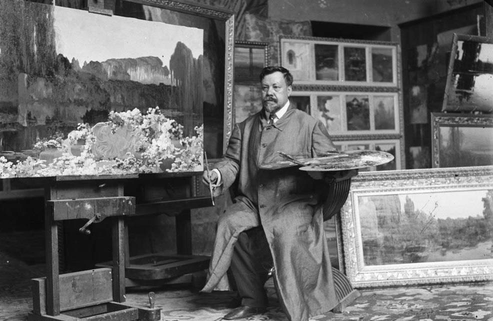 Imatge